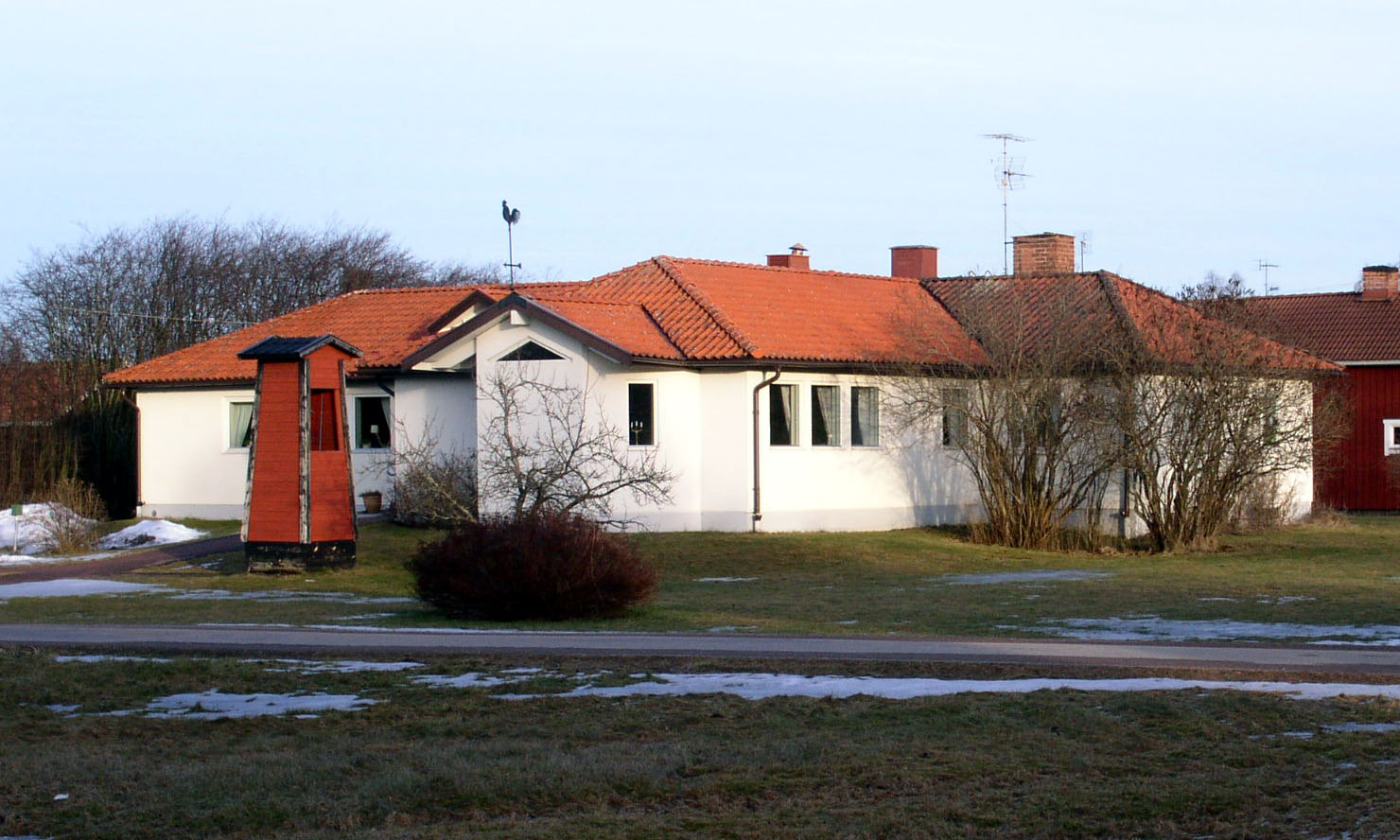 Björbo Lillkyrka, Björbo, Dalarna